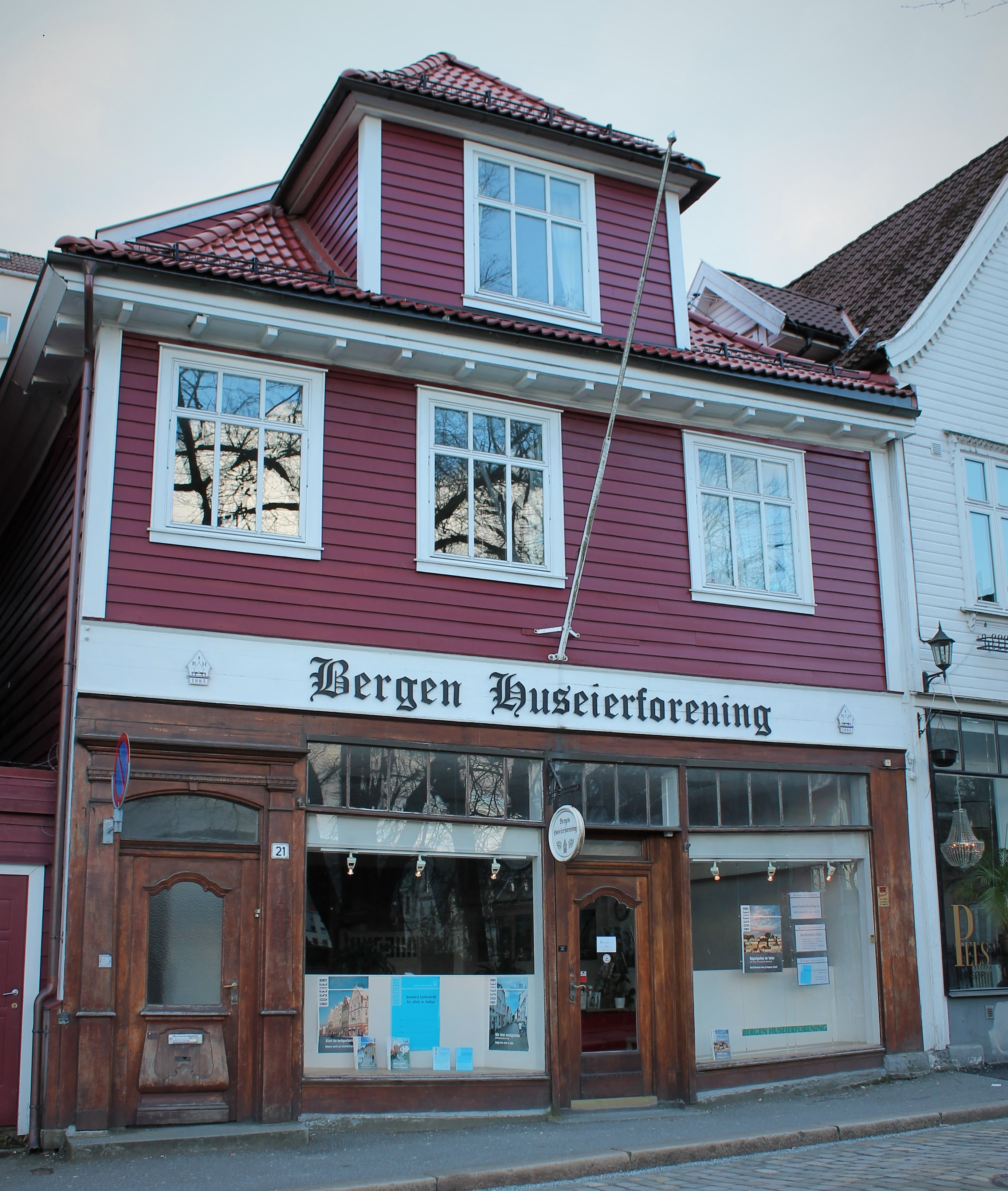 Bergen Huseierforenings lokaler i Øvregaten 21